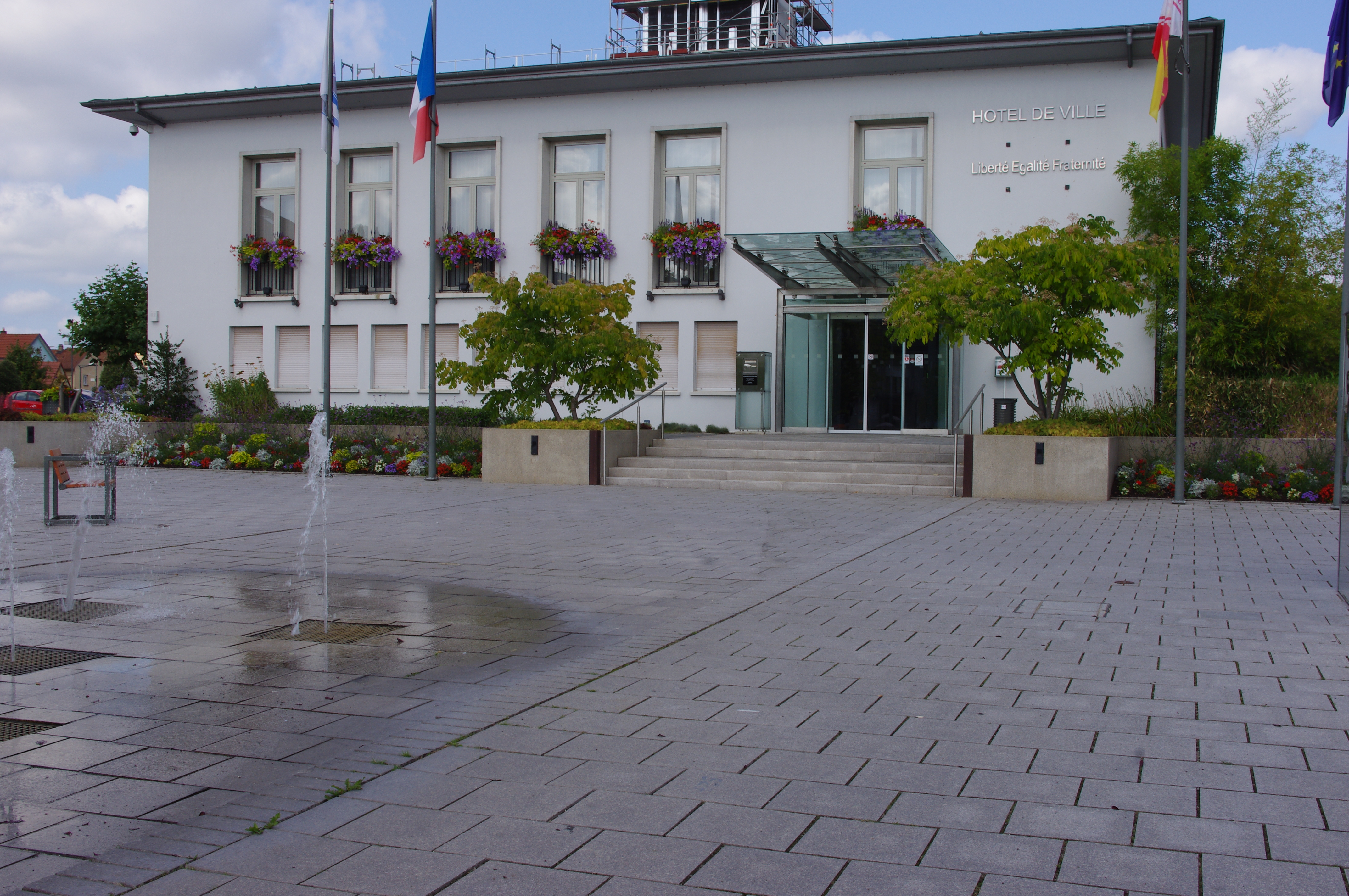 place de l'hôtel de ville avec jets d'eau